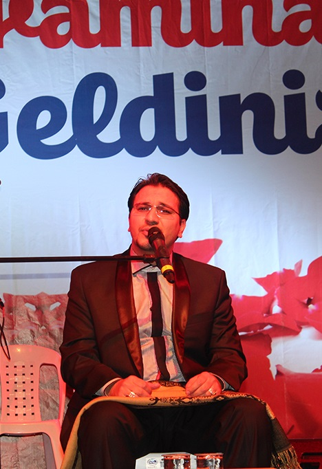 تلاوت استاد شاکرنژاد در ترکیه